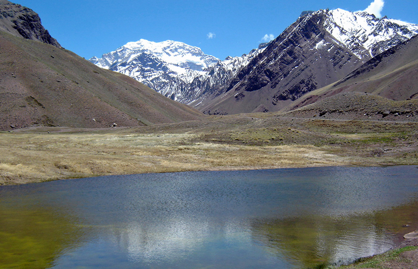 Aconcagua mountain, from entrance Parque Provincial Aconcagua, ARG